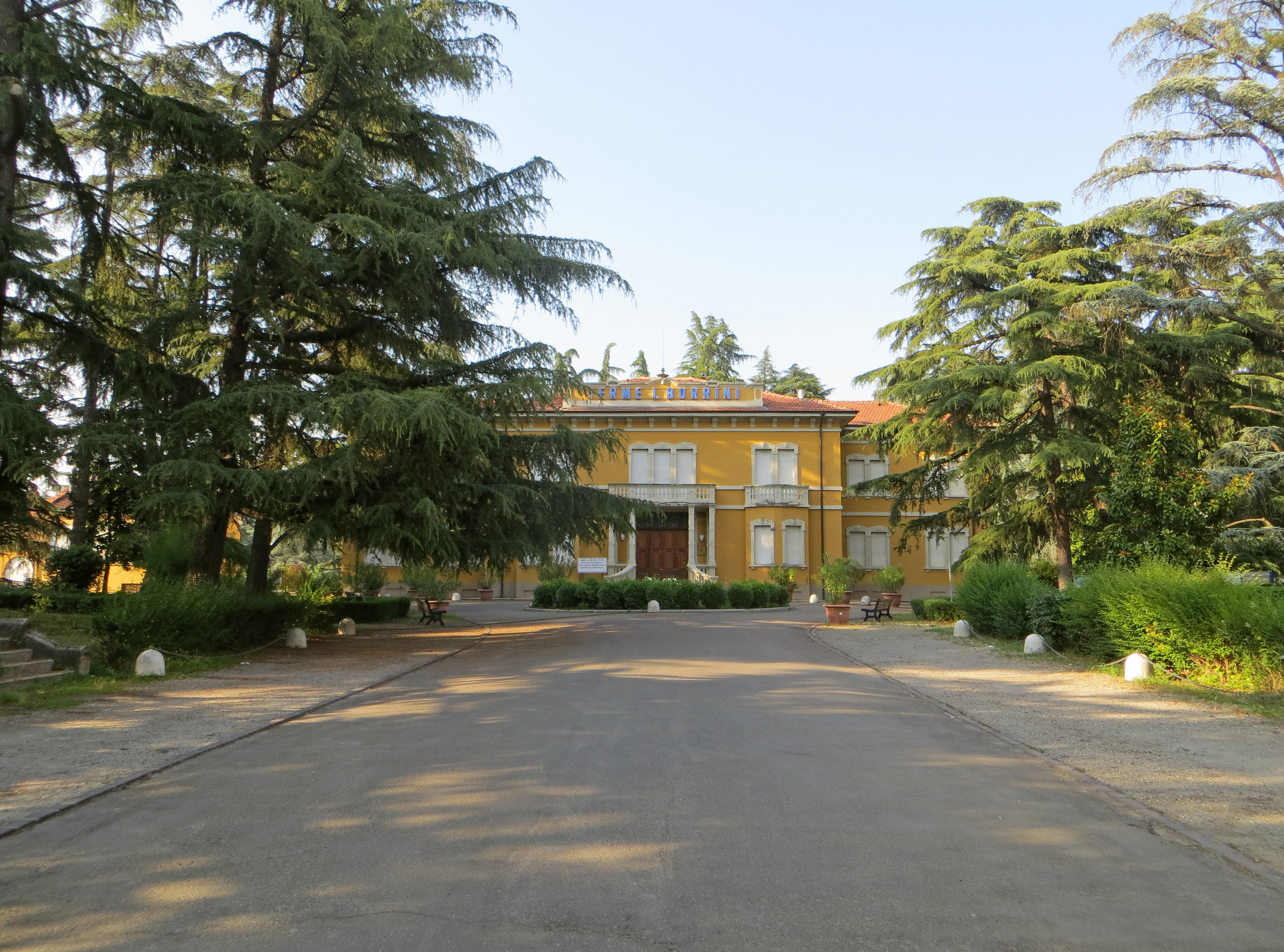 Terme Borrini (Monticelli Terme, Montechiarugolo) - facciata